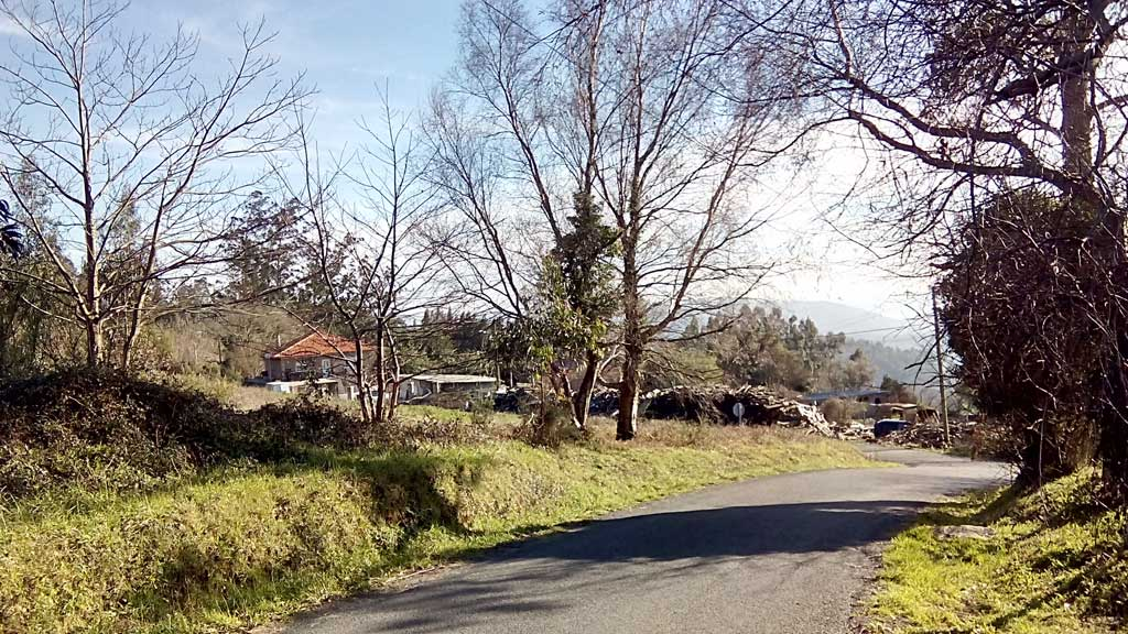 Vista de Lagoela, Sedes.